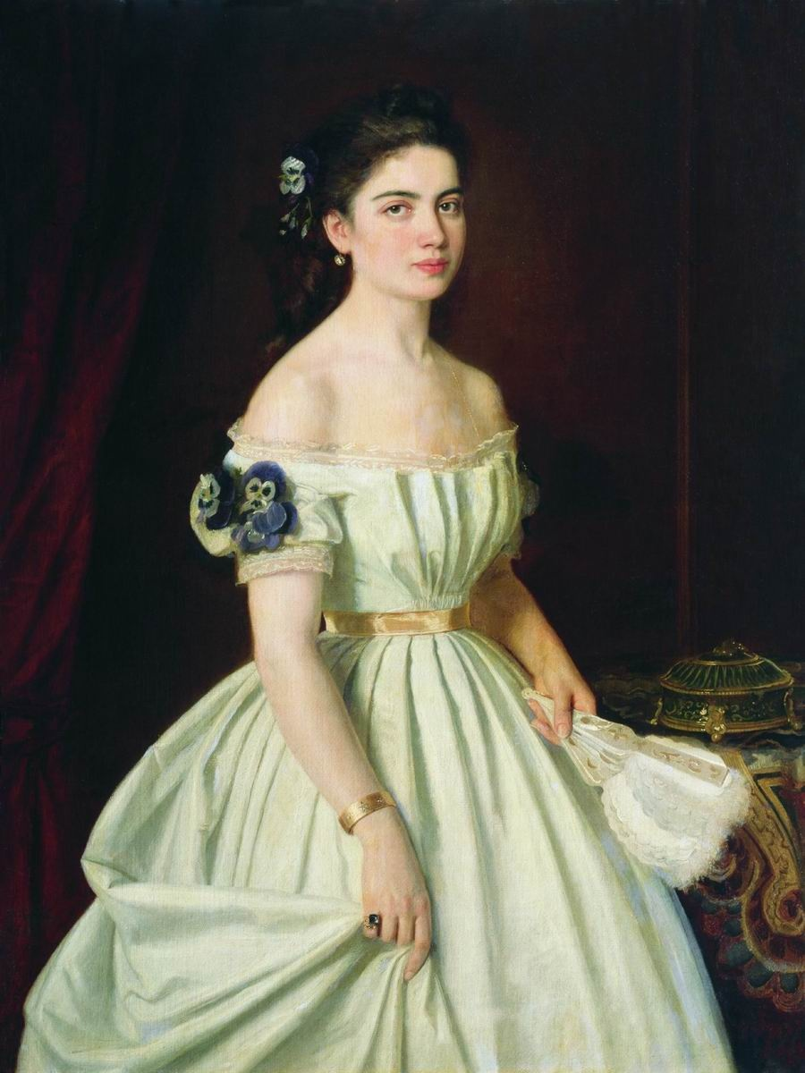 Екатерина Алексеевна Васильчикова (1825-1888), дочь Алексея Васильевича Васильчикова (1772-1854), была замужем за В. А. Черкасским (1824-1878).